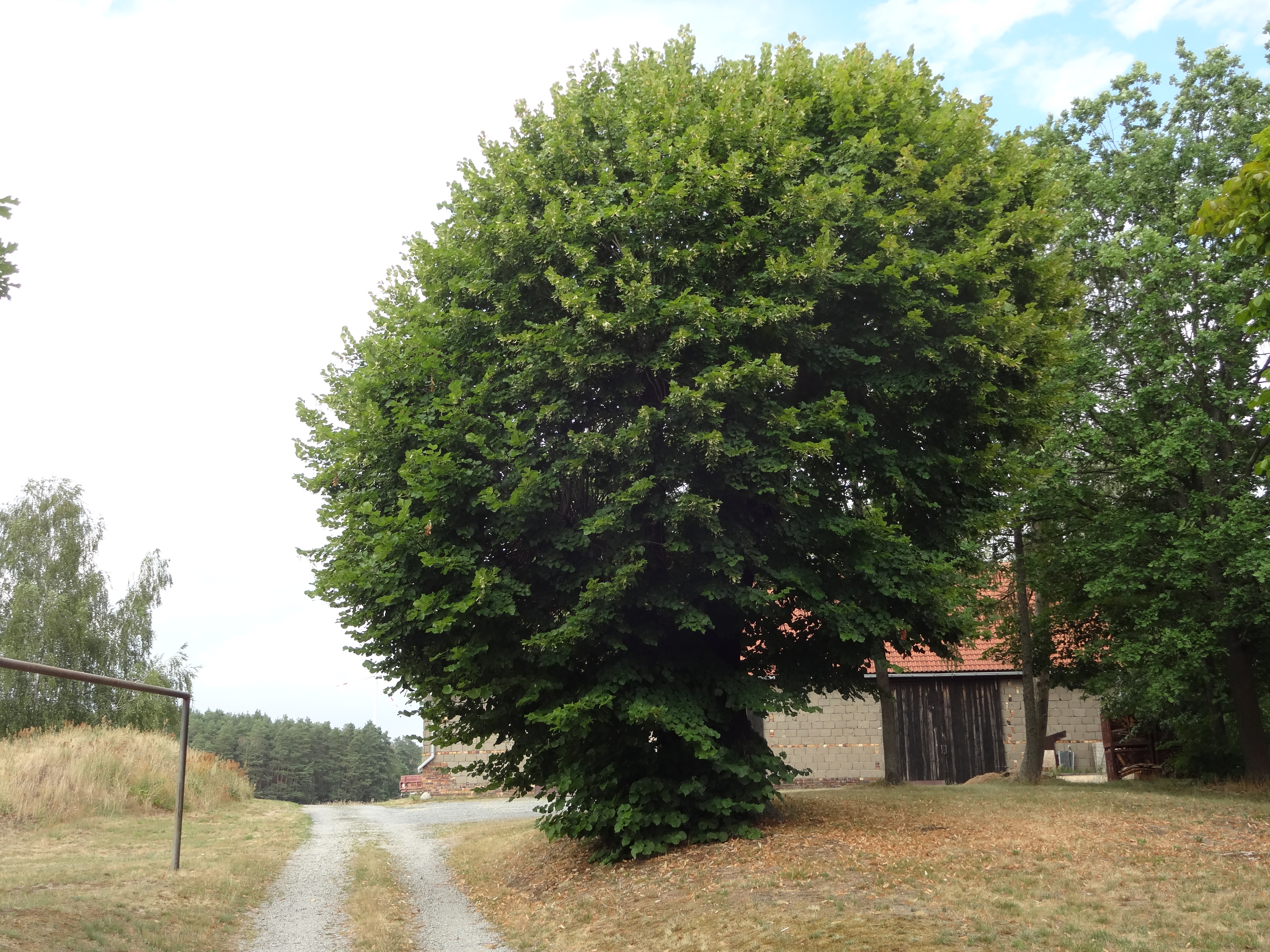 Naturdenkmal Sommerlinde am Schulberg in Rutzkau